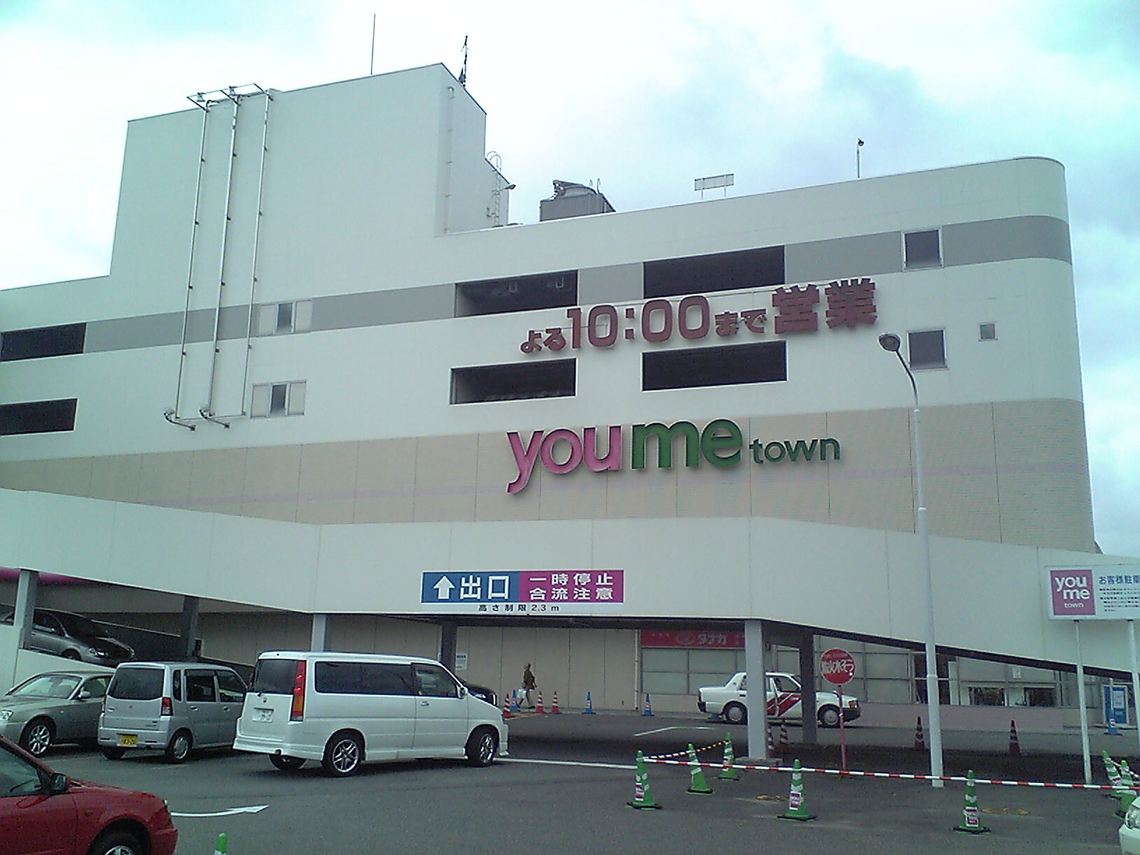 福岡県筑紫野市にある、ゆめタウン筑紫野